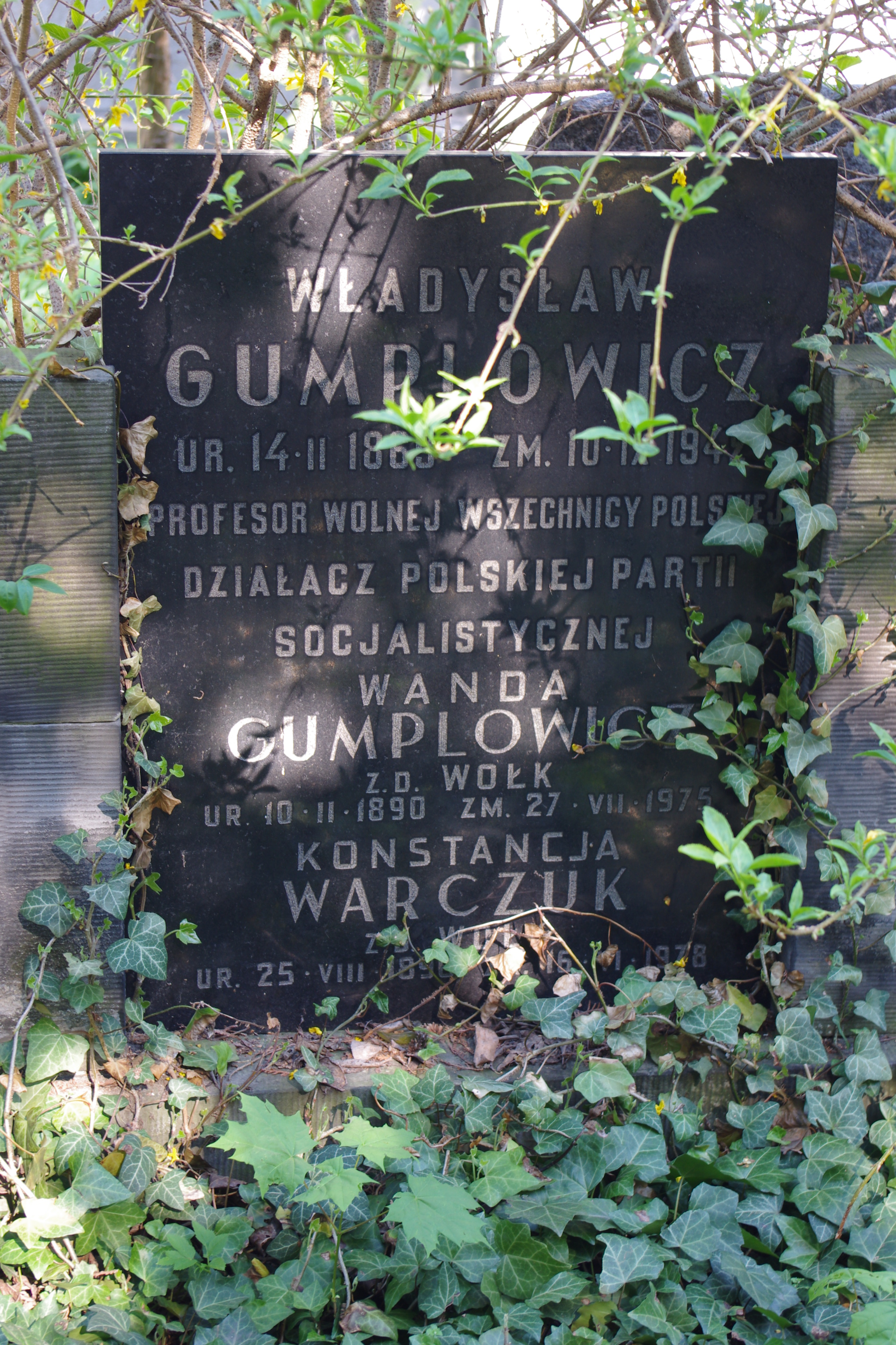 Grób prof. Władysława Gumplowicza na Cmentarzu ewangelicko-reformowanym w Warszawie